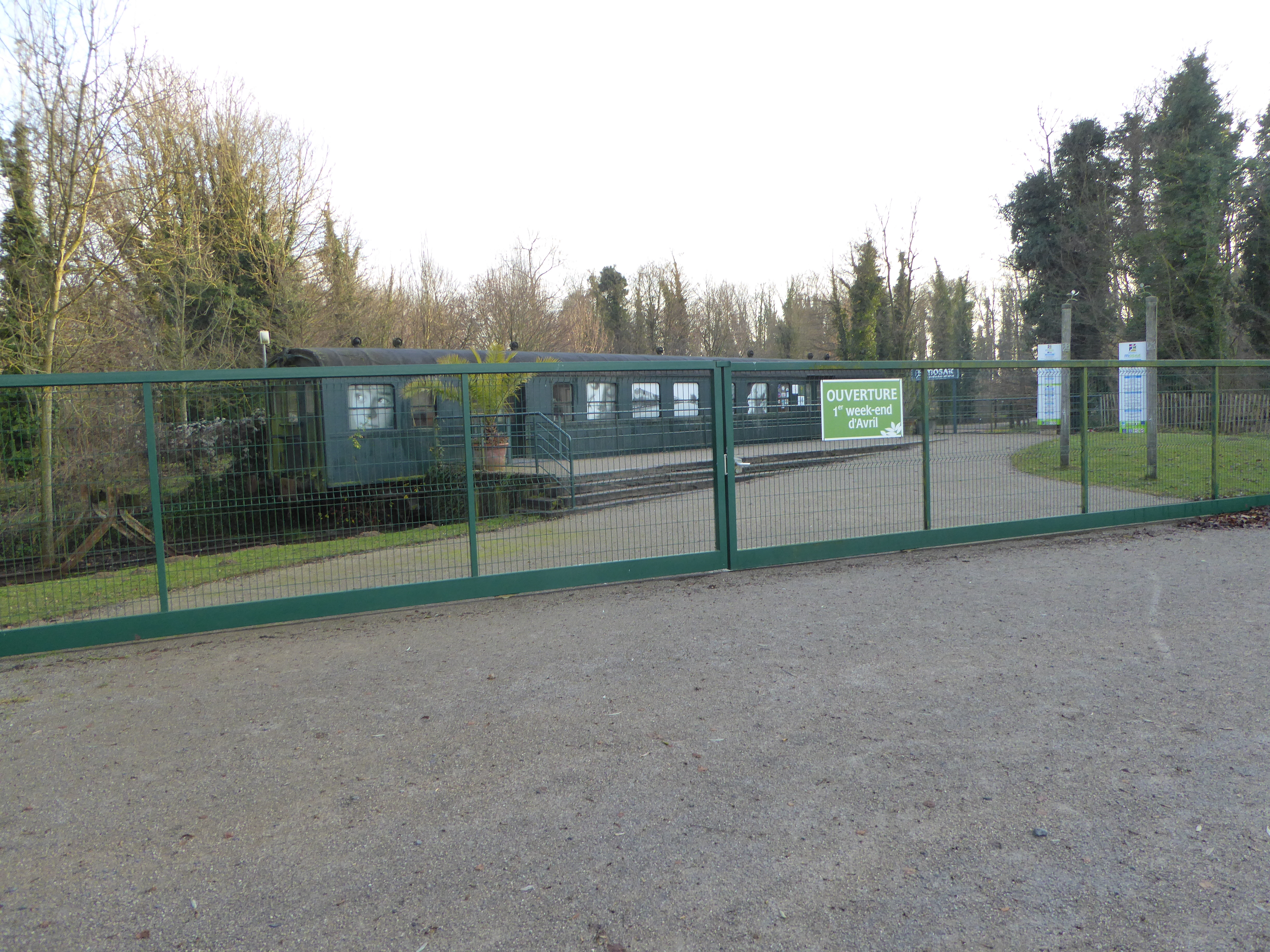 Houplin-Ancoisne Nord en Hauts-de-France. France